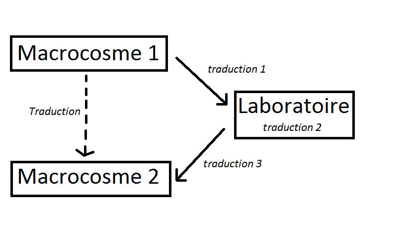 Ce schéma est inspiré de la figure "La Traduction est composée de trois traductions élémentaires qui font passer le monde d'un état à un autre", p. 103 de l'ouvrage "Agir dans un monde incertain" (Callon, Lascoumes, Barthe 2001)